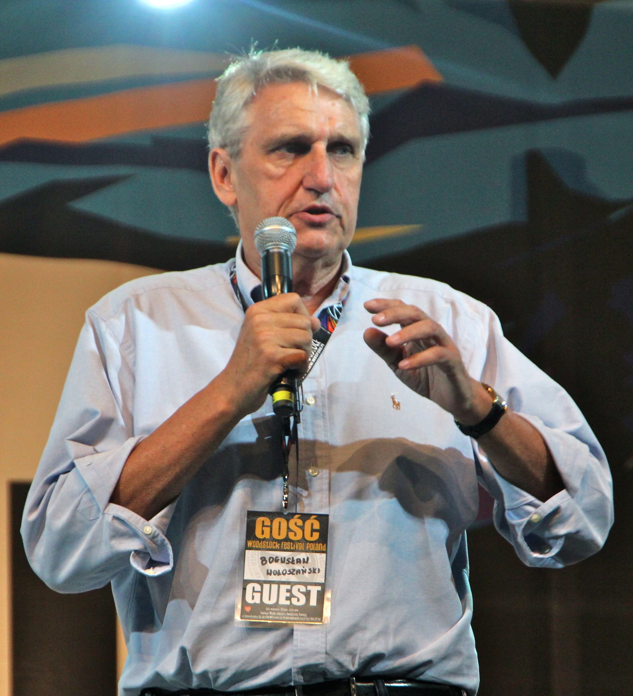 Przystanek Woodstock w 2012 r.